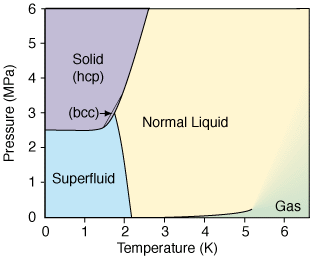 Phasendiagramm 4He